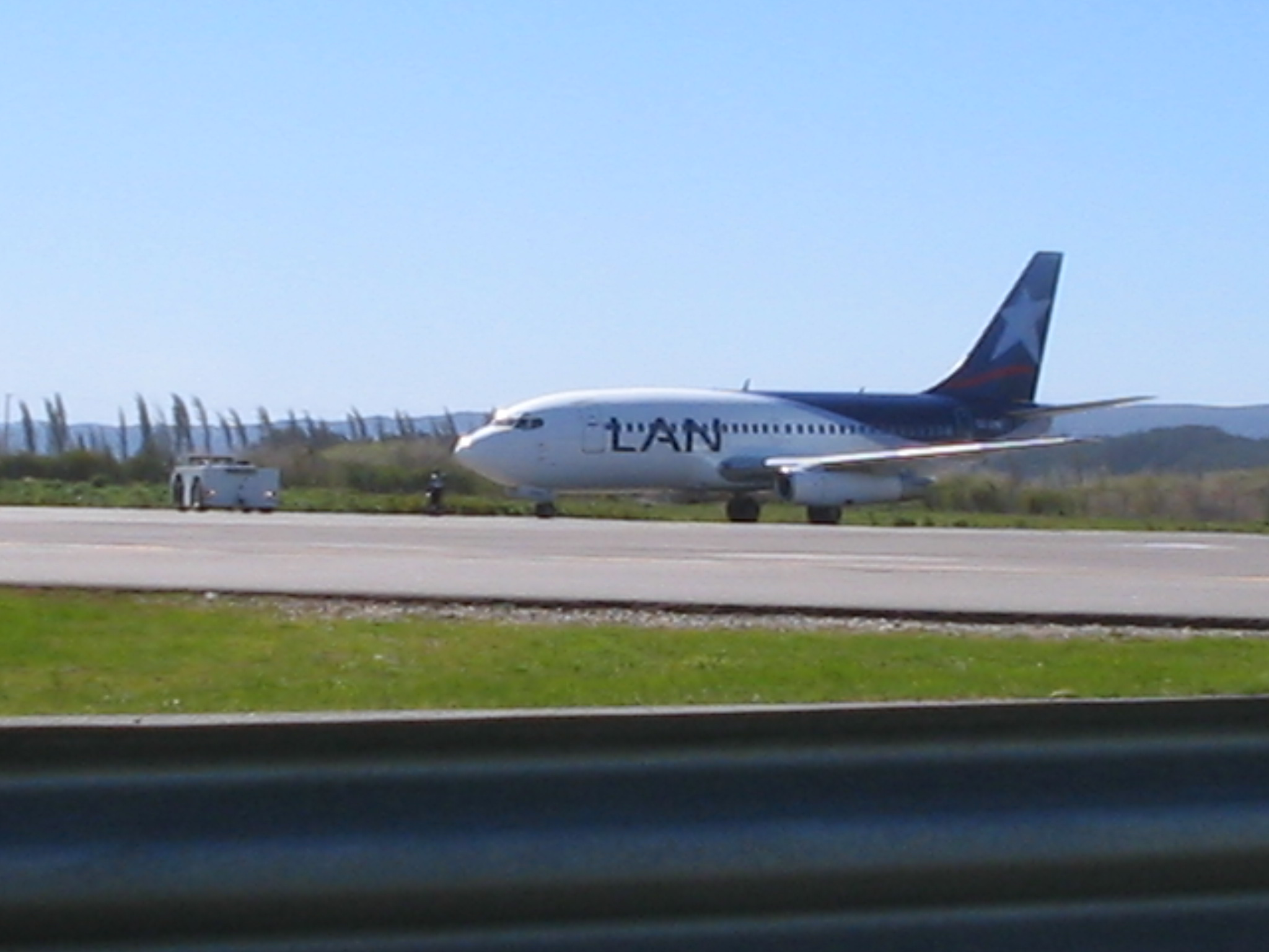 Fotografía tomada por Matias Valenzuela en el aeropuerto Carriel Sur, el dia 12 de Septiembre del año 2005. Se ceden los derechos de esta imagen a Wikipedia